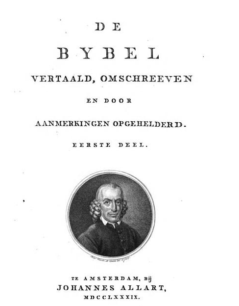 Titelblad bijbelvertaling door Willem Antony van Vloten (1740-1809) met zijn portret